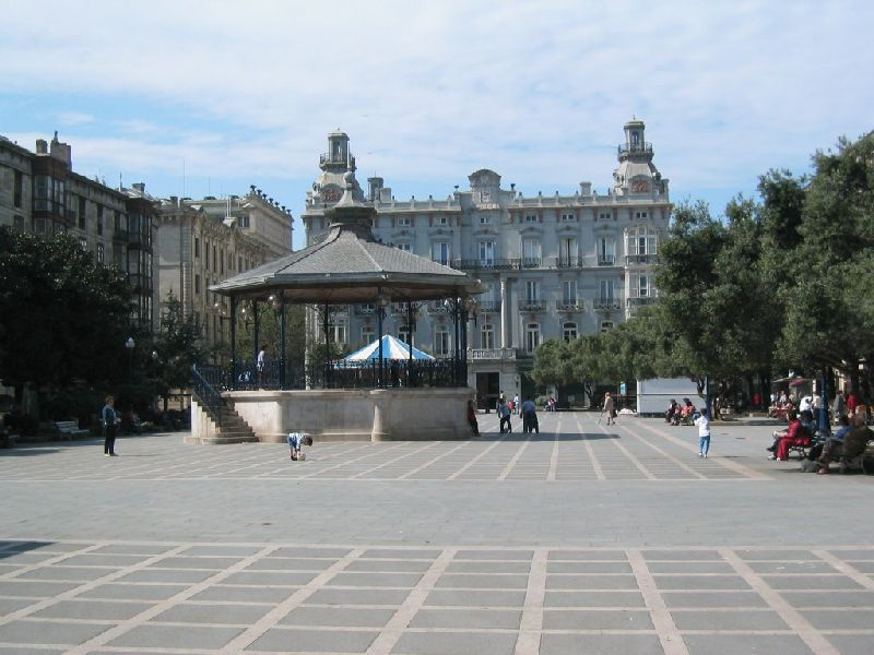 Plaza de Pombo en Santander